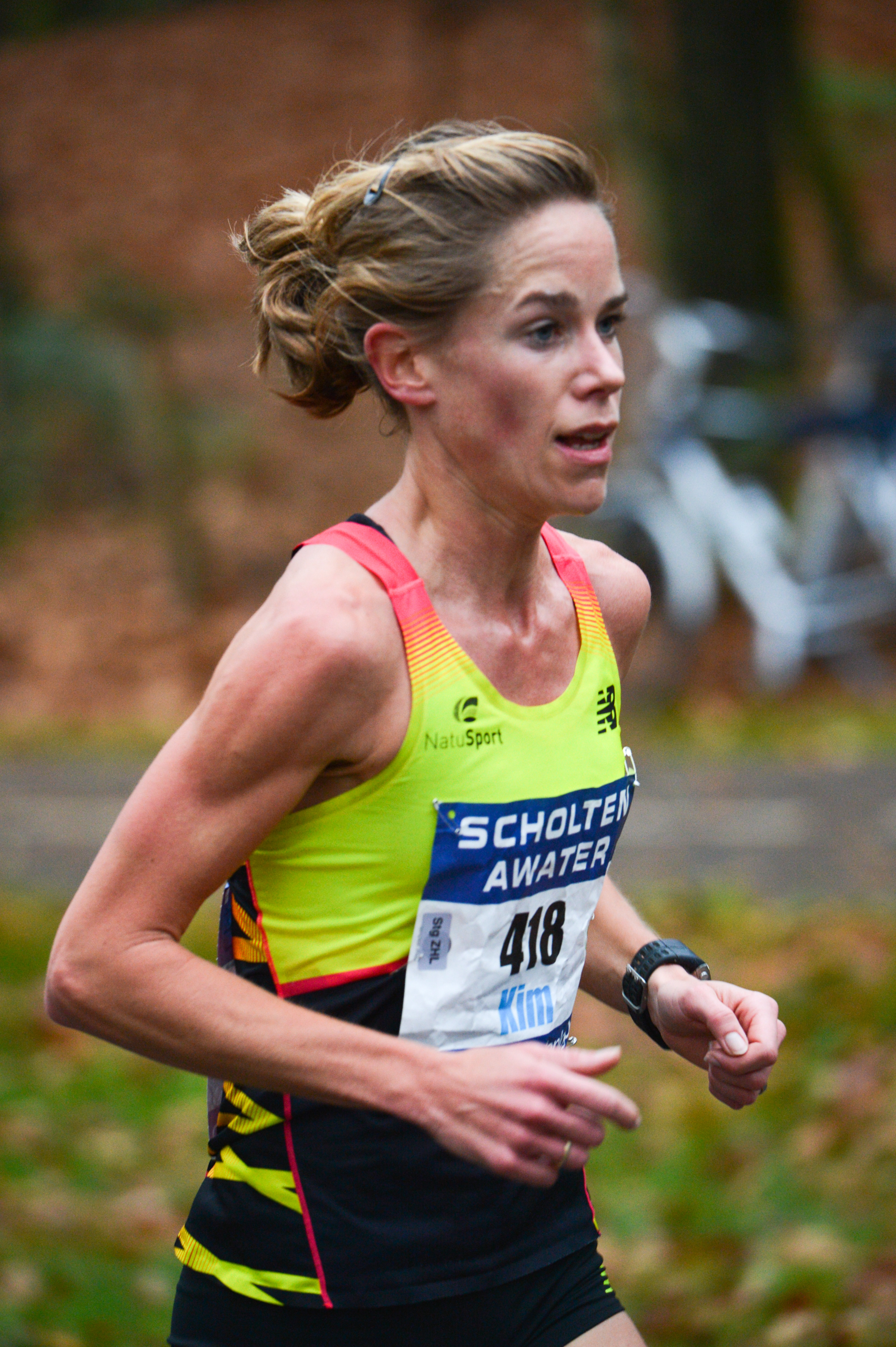 Kim Dillen in actie tijdens de Zevenheuvelenloop 2015.